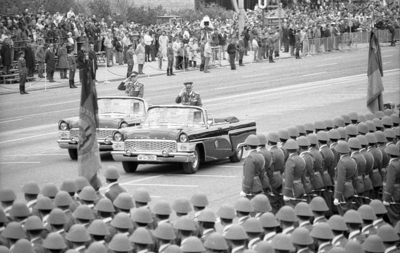 Berlin, 39. Jahrestag DDR-Gründung, Parade ADN-ZB/Oberst/7.10.1988/Berlin: Jahrtestag/Ehrenparade Zehntausende Berliner und Gäste der Hauptstadt erleben gemeinsam mit der Partei- und Staatsführung die Ehrenparade der NVA. Der Minister für Nationale Verteidigung der DDR, Armeegeneral Heinz Keßler (r.), Mitglied des Politbüros des ZK der SED, und der Kommandierende der Ehrenparade, Generaloberst Horst Stechbarth (l.), Stellvertreter des Ministerium für Nationale Verteidigung und Chef der Landstreitkräfte, während des militärischen Zeremoniells zu Beginn der Parade. Abgebildete Personen: Stechbarth, Horst: Stellvertretender Minister für Nationale Verteidigung, Generaloberst, DDR Keßler, Heinz: Minister für Verteidigung, Armeegeneral, DDR (GND 119196719)